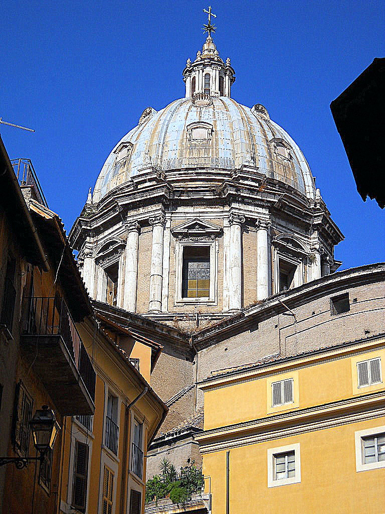 Roma - Cupola di Dan'Andrea della Valle